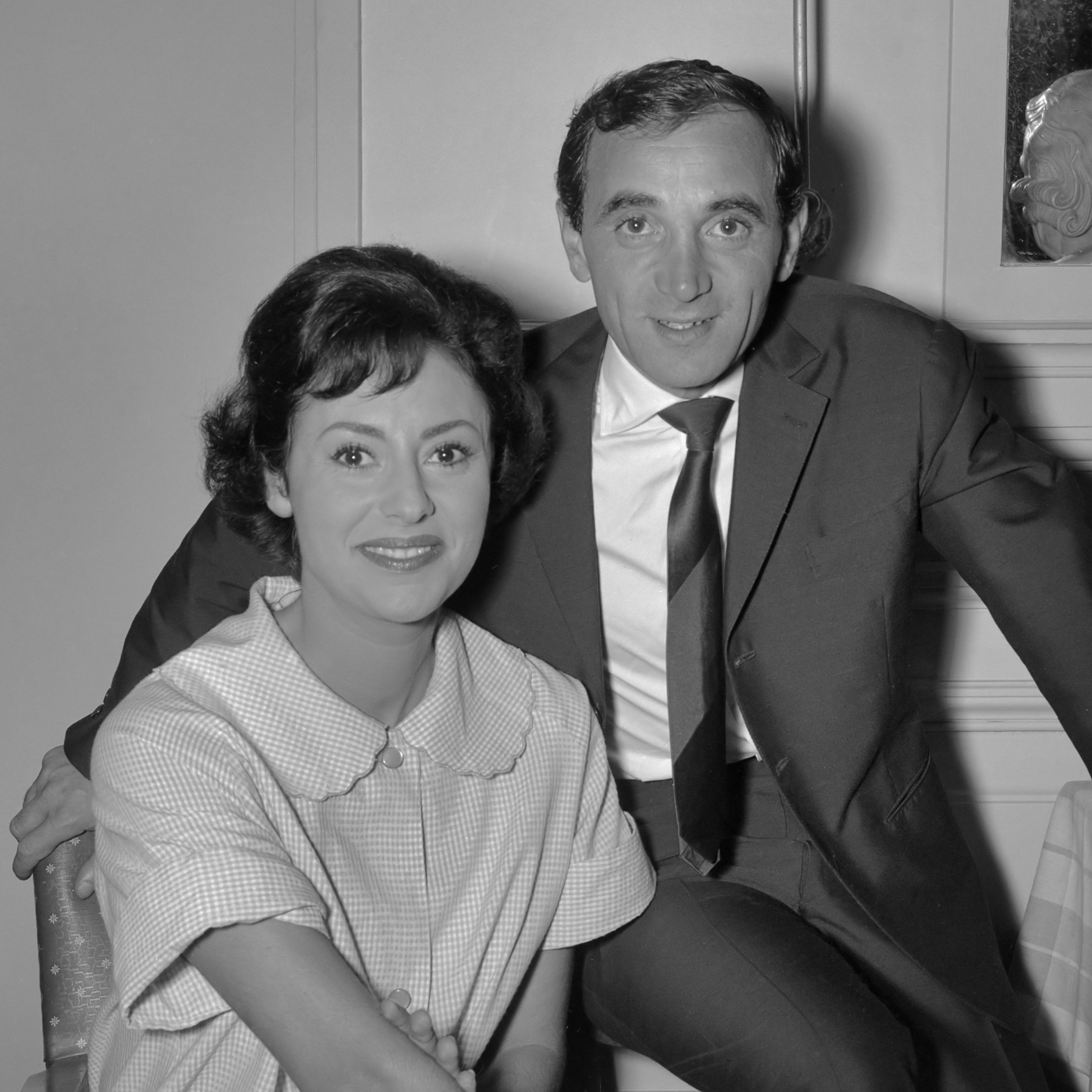 Grand Gala Du Disque in het Kurhaus te Scheveningen. Charles Aznavour en Caterina Valente 30 september 1961